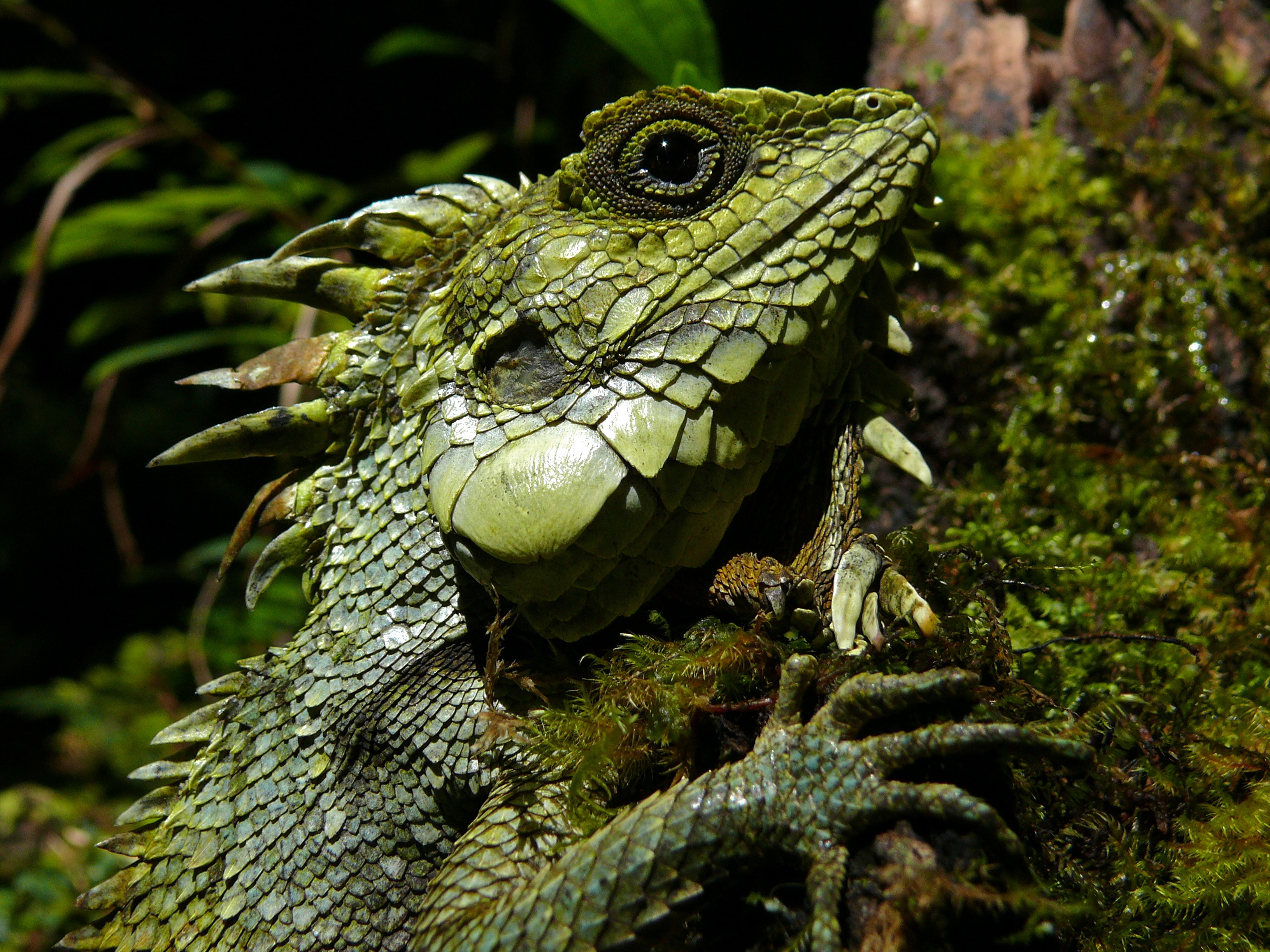 Mount Kinabalu NP, Sabah, MALAYSIA